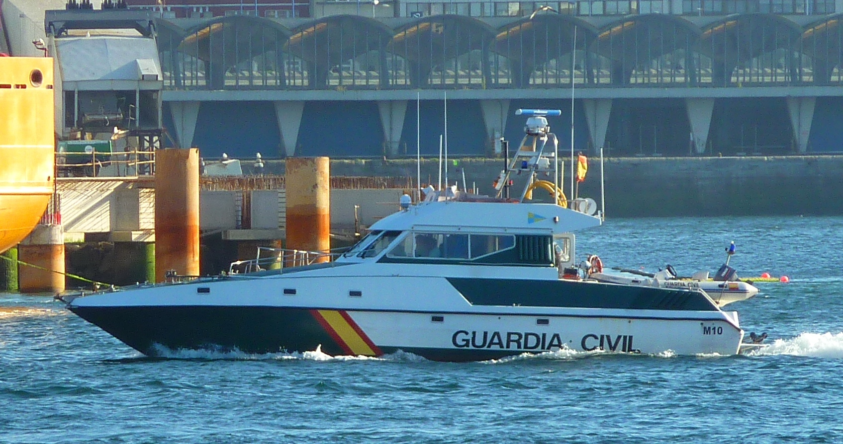 Patrullera clase Rodman-55M M10 del Servicio Marítimo de la Guardia Civil.